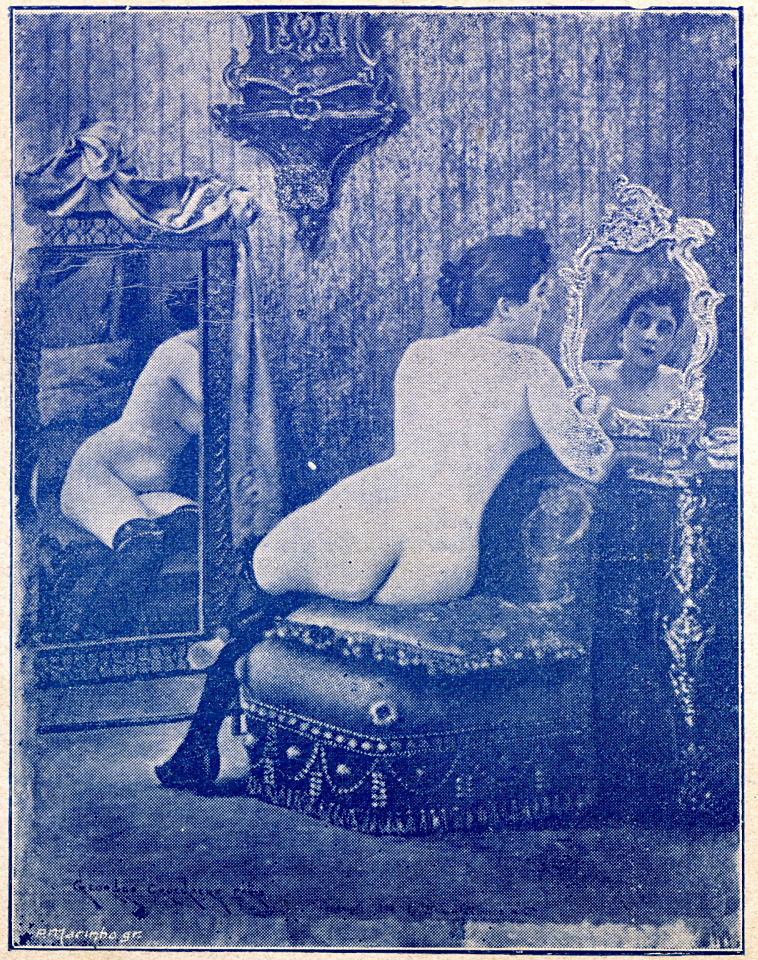 fototipia